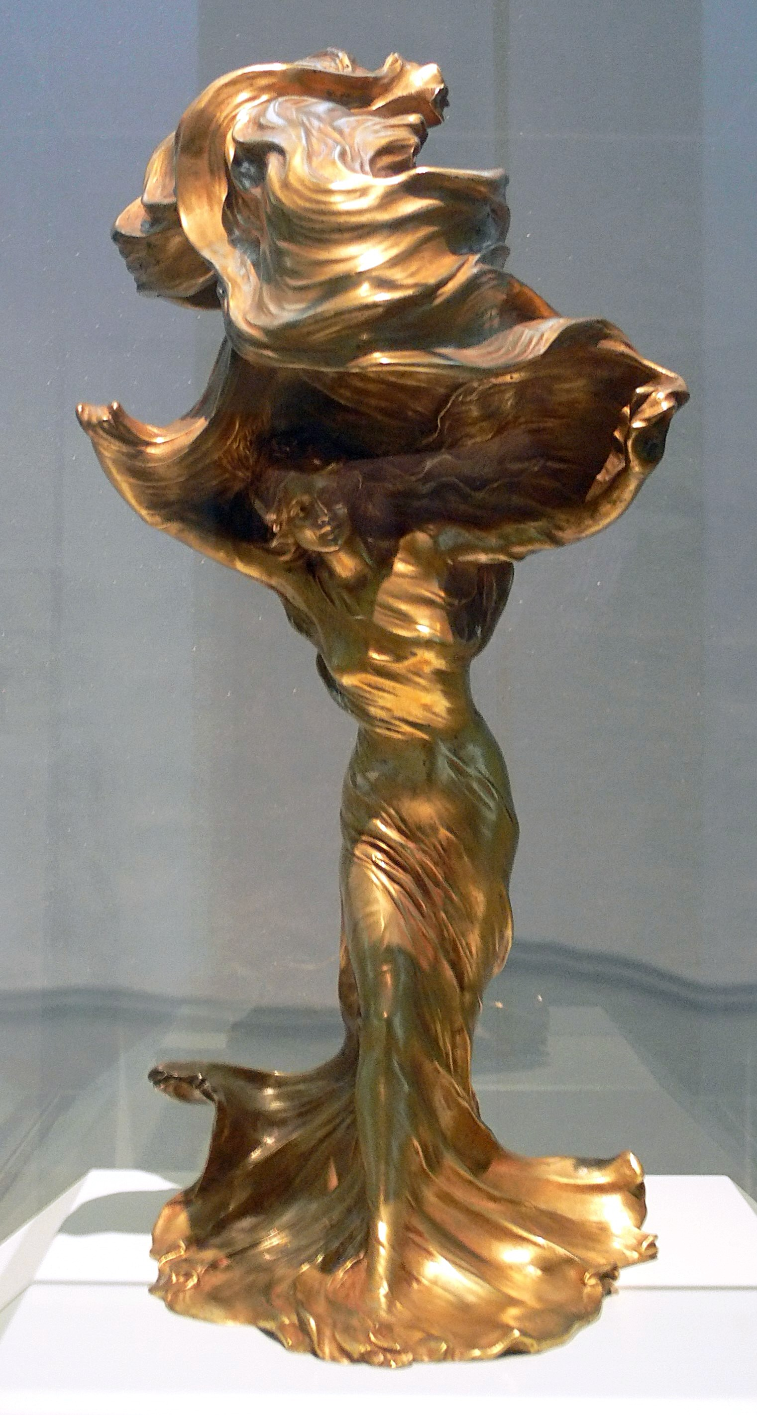 Tischlampe (mit zwei Glühlampenfassungen) in Gestalt der Schleiertänzerin Loïe Fuller; Modell: Raoul Larche (1860-1912), Ausführung: Gießerei Siot-Decauville, Paris 1900; Bronze vergoldet Bayerisches Nationalmuseum, München